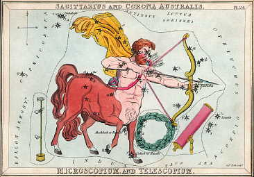 This image was copied from en. The original description was: Sagittarius as depicted in Urania’s Mirror, a set of constellation cards published in London c. 1825. File:Sagittariusurania.jpg